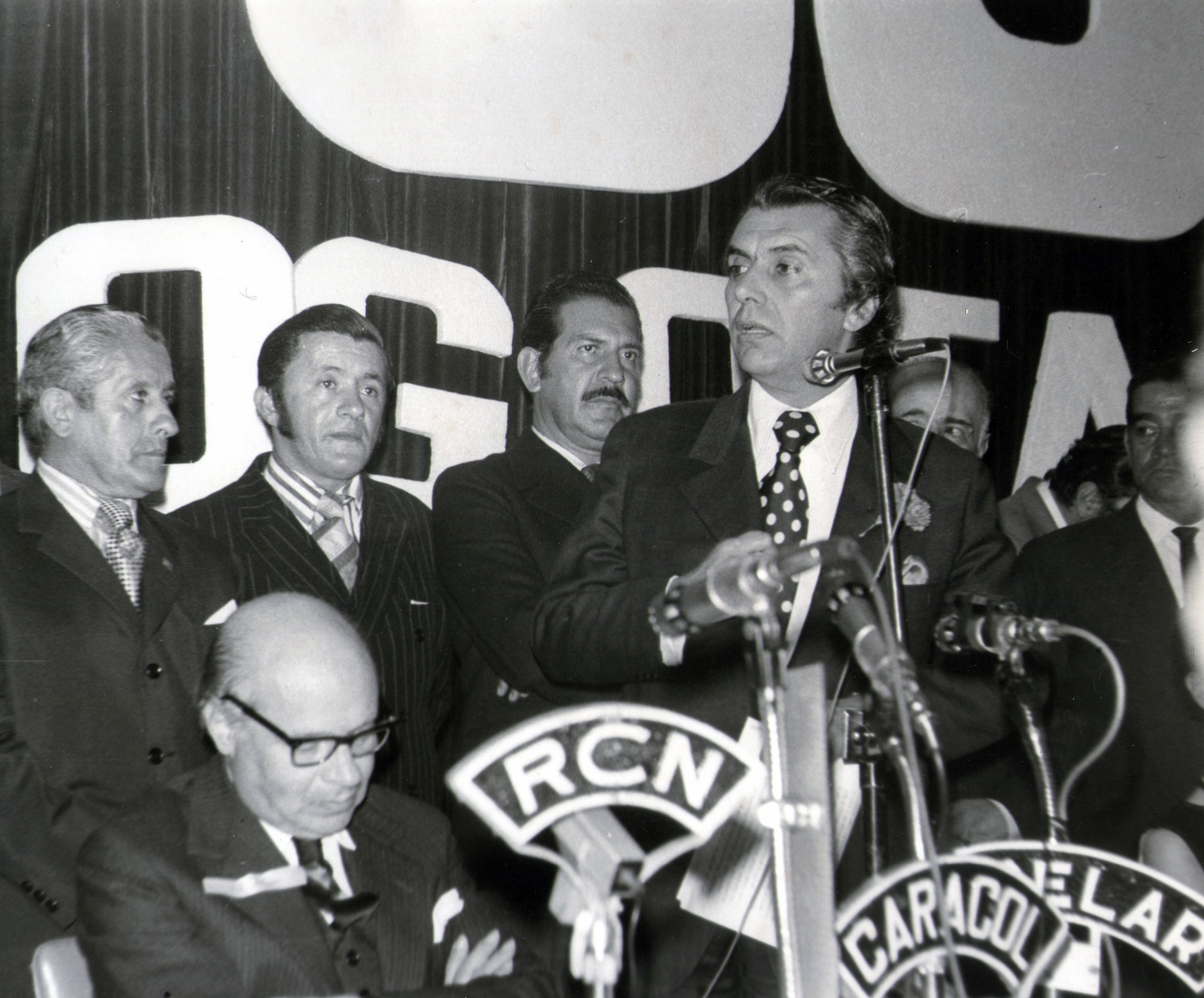 Alfonso López Michelsen y Álvaro Uribe Rueda fundadores del Movimiento Revolucionario Liberal (MRL) que tuvo mucha fuerza politica en Colombia durante el siglo XX.